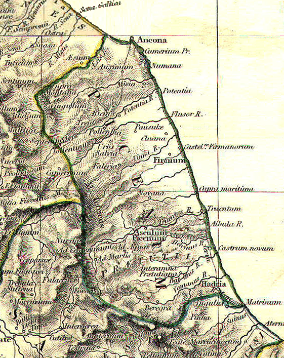 Reference map for Picenum